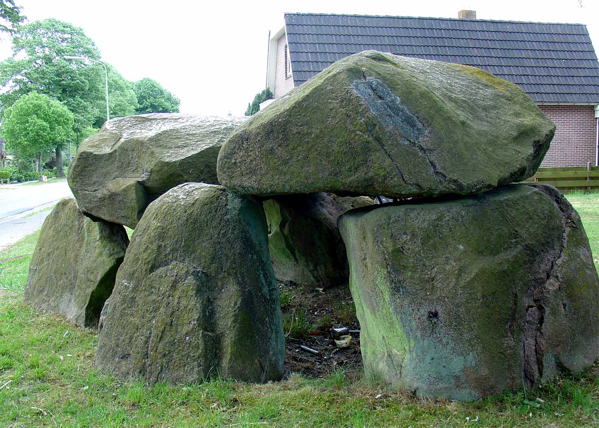 Hunebed D9 in Annen